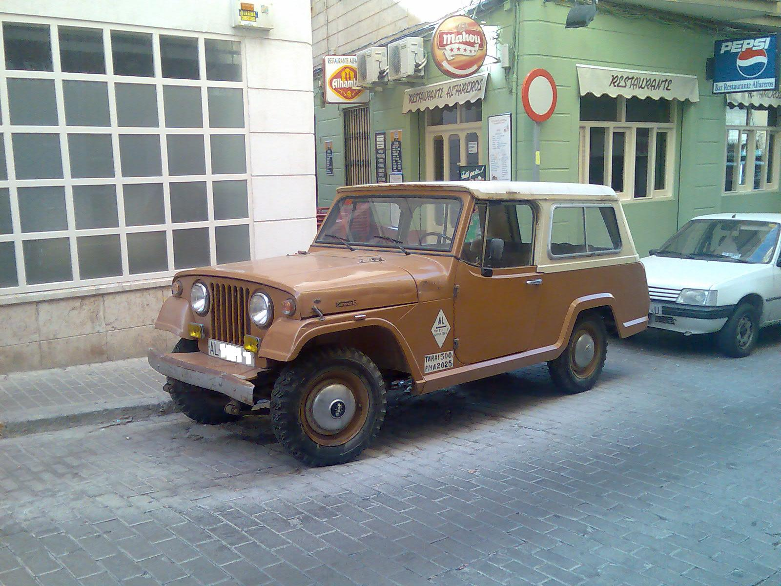 Jeep Ebro Comando S, fotografía tomada el 31-1-2008 cerca de la Puerta de Purchena de Almería, España.